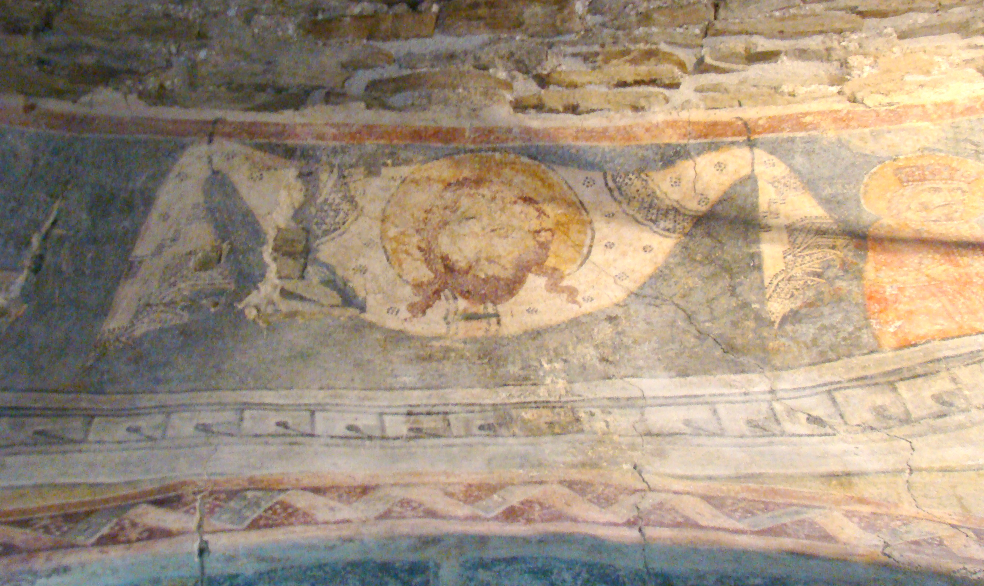 Biserica „Sf.Nicolae”, Densuș, Hunedoara